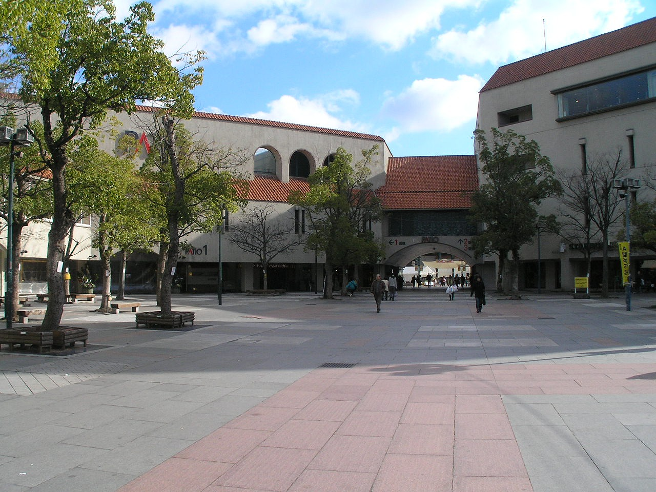 須磨パティオ（専門店街）名谷駅前 神戸市営地下鉄西神・山手線